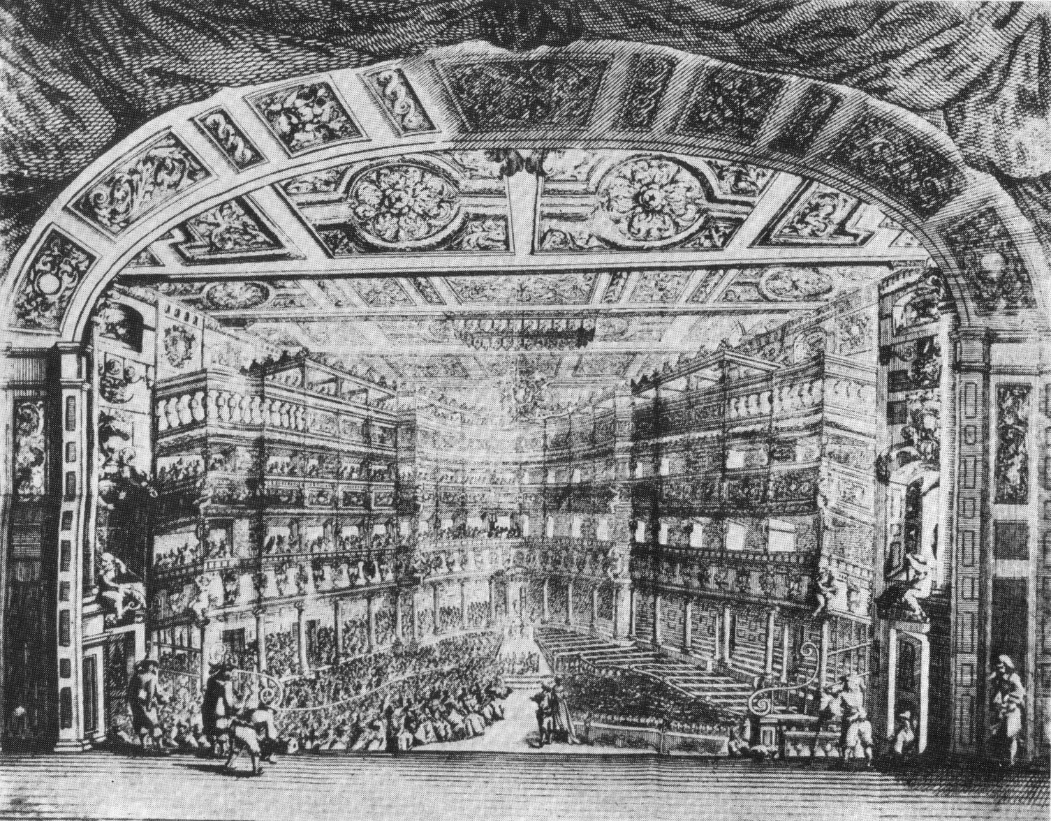 Silvio degli atti, incisione del palcoscenico del teatro alla pergola di Firenze, 1660-1700 ca.jpg